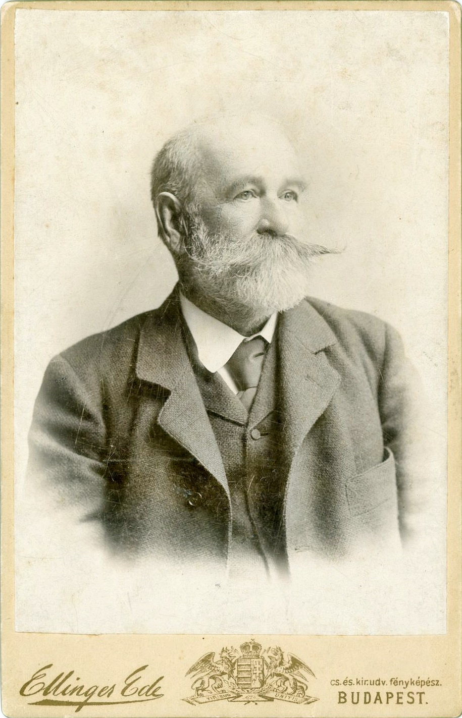 Abonyi Lajos író, földbirtokos